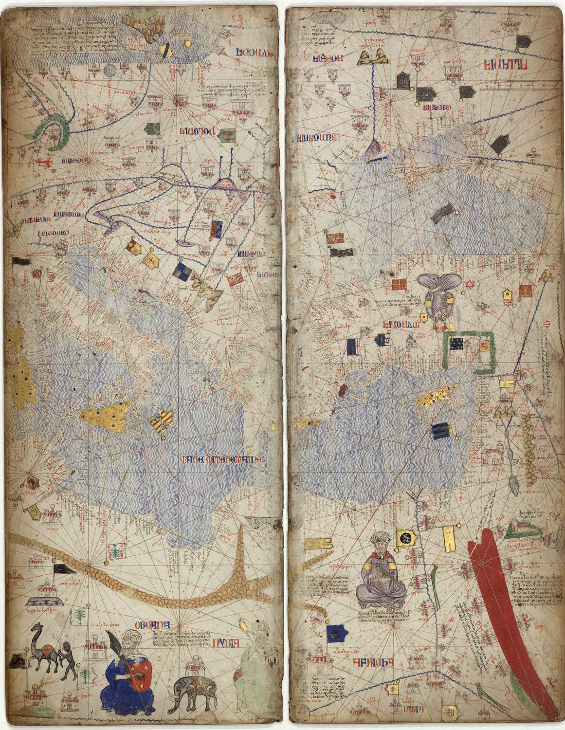 Full 4 de l'Atles Català de Biblioteca Nacional de França